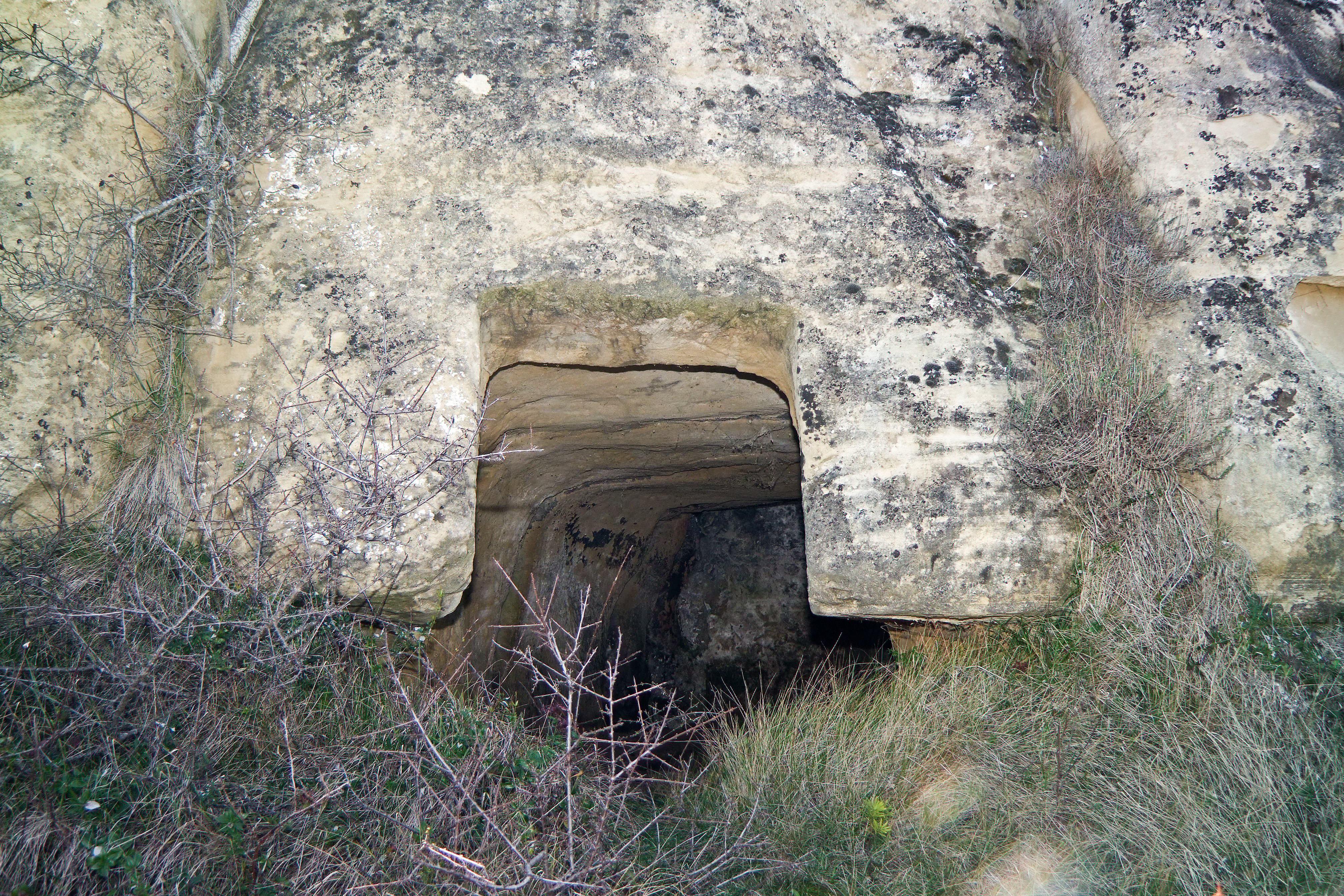 Ermita de San Martín en la localidad de Castilseco, La Rioja - España